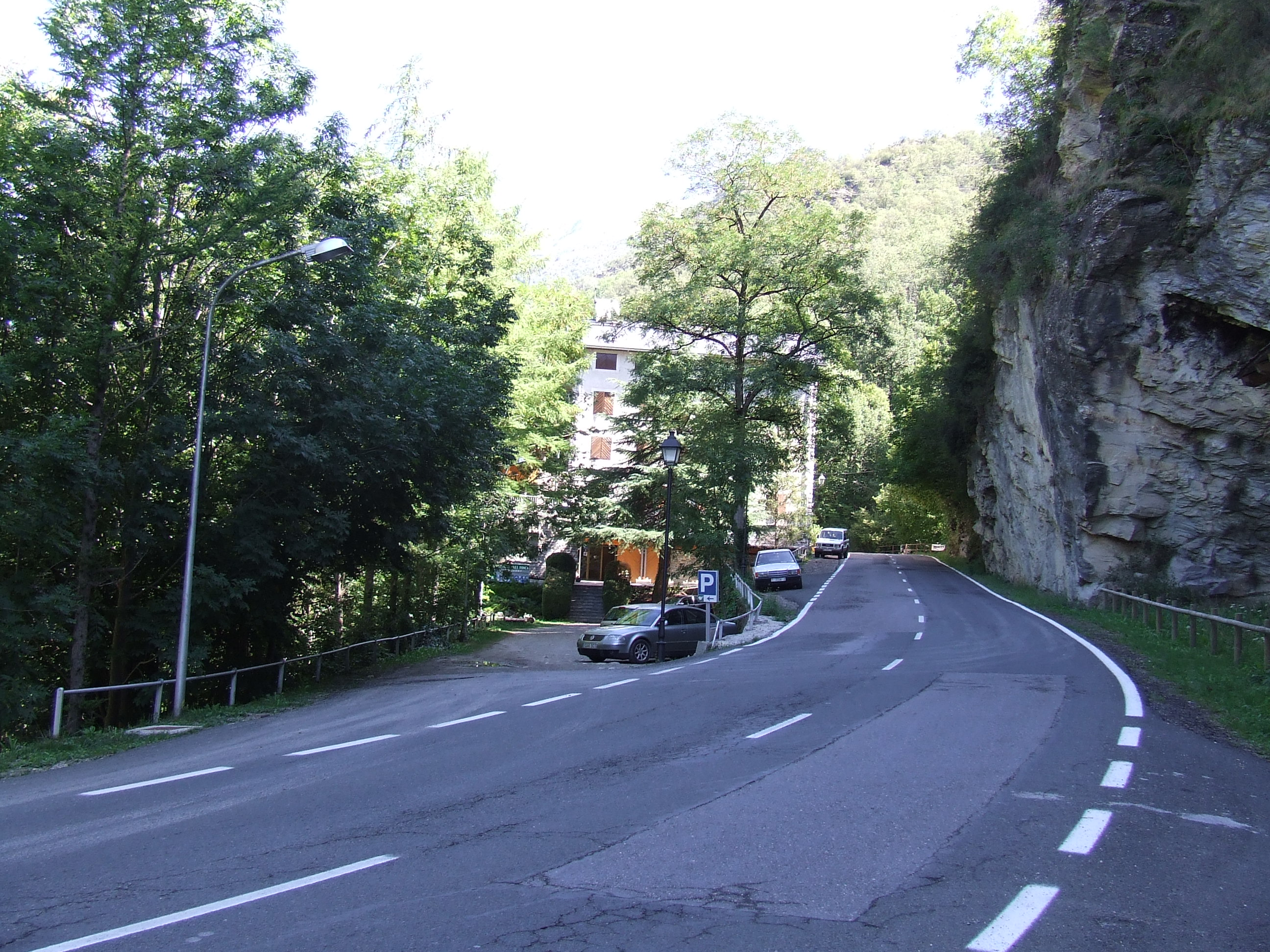 La carretera L-503 al seu pas per Molinos (Mont-sor, la Torre de Cabdella, Pallars Jussà)